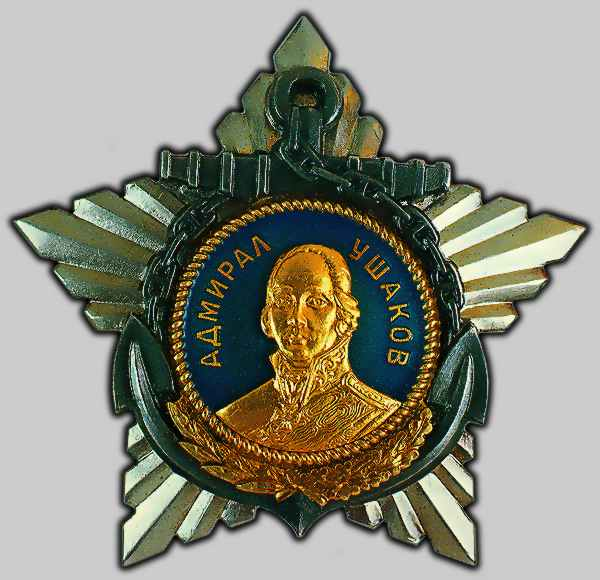 Орден Ушакова 1-ой степени, орден изготовлен по эскизу архитектора М.А.Шепилевского.